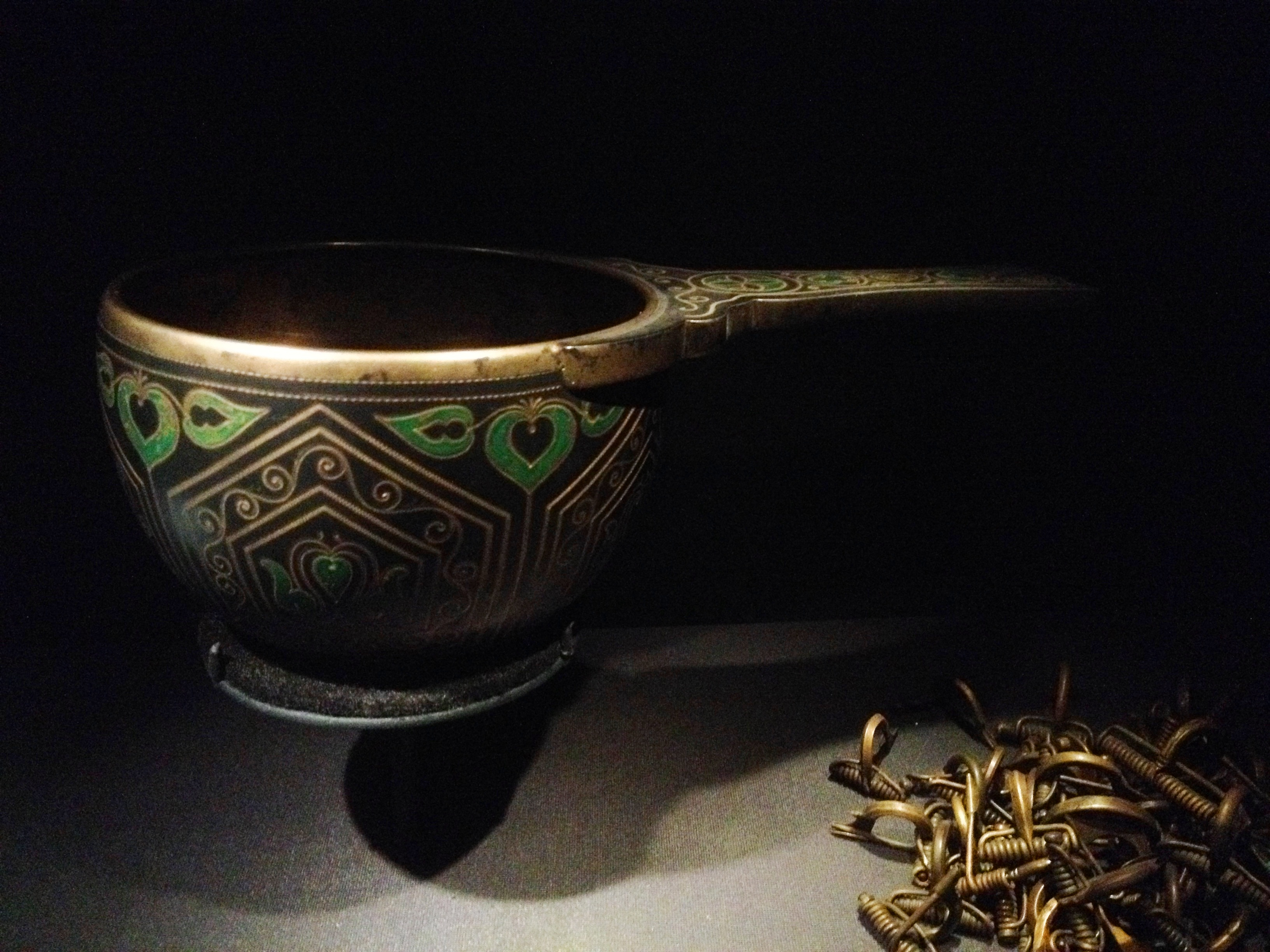 Bad Pyrmont, Museum im Schloss, antike Schöpfkelle und Fibeln aus dem Brunnenfund von 1863. Die Information des Museums dazu lautet: "Der kostbarste und schönste Fund ist die emaillierte Schöpfkelle, die im 2. Jahrhundert nach Christus gefertigt wurde. Es gibt nur fünf vergleichbare Gefäße, die in Großbritannien, Belgien und Frankreich als Einzelfunde entdeckt wurden. Die Pyrmonter Schöpfkelle besteht aus Messing und Bronze. Die Zwischenräume der Haupt- und Nebenfelder sind mit blauem und grünem Email ausgefüllt."